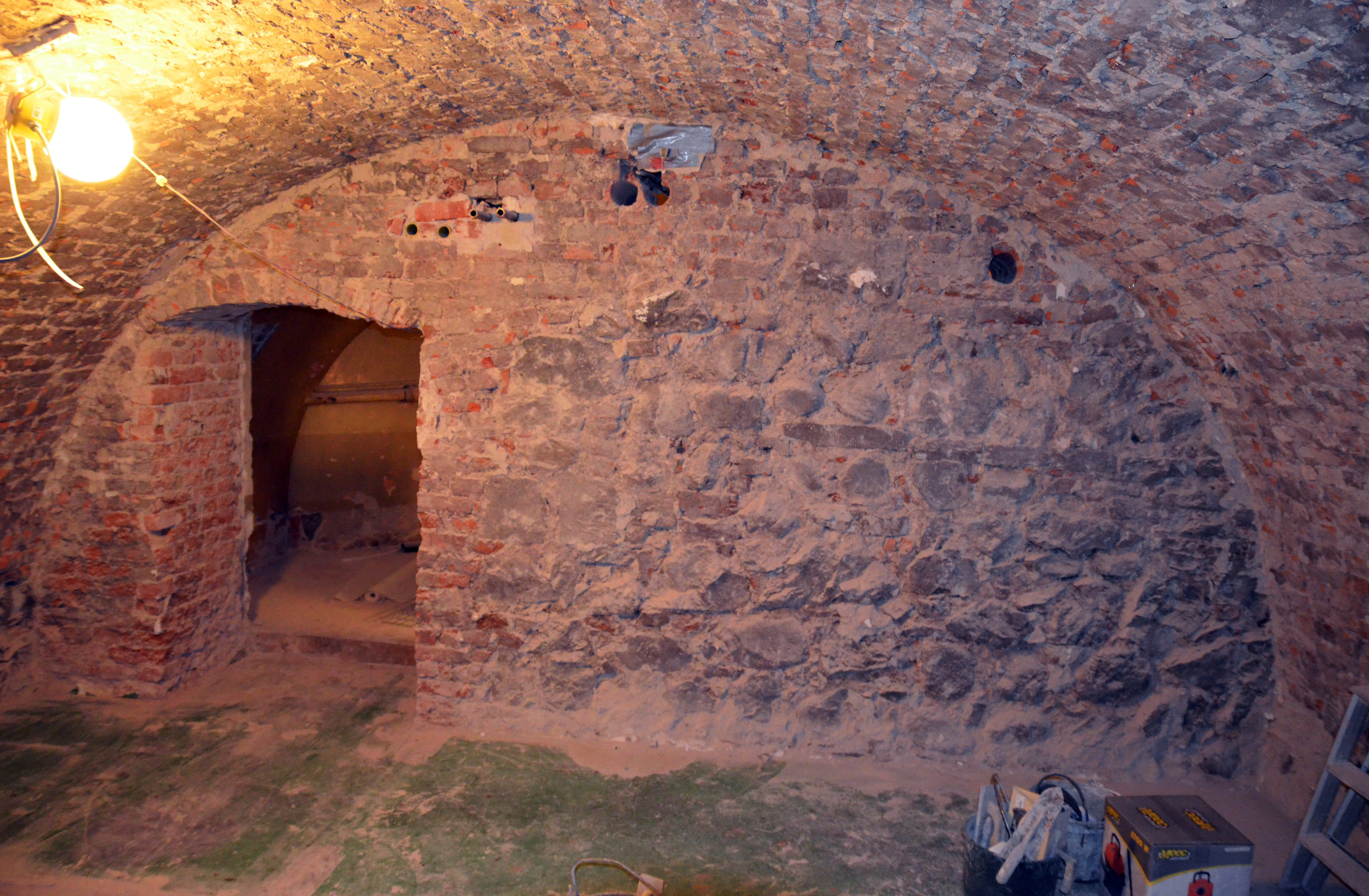 Storkyrkobrinken 13, Mercurius 12, f d 7, källare. -FOTOGRAF: Bergman, Anna. BILDNUMMER:Stadsmuseet i Stockholm